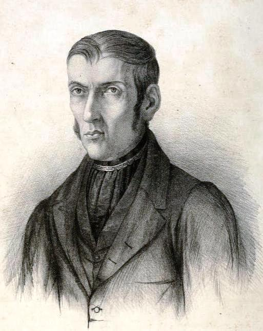 Juan Nepomuceno Troncoso